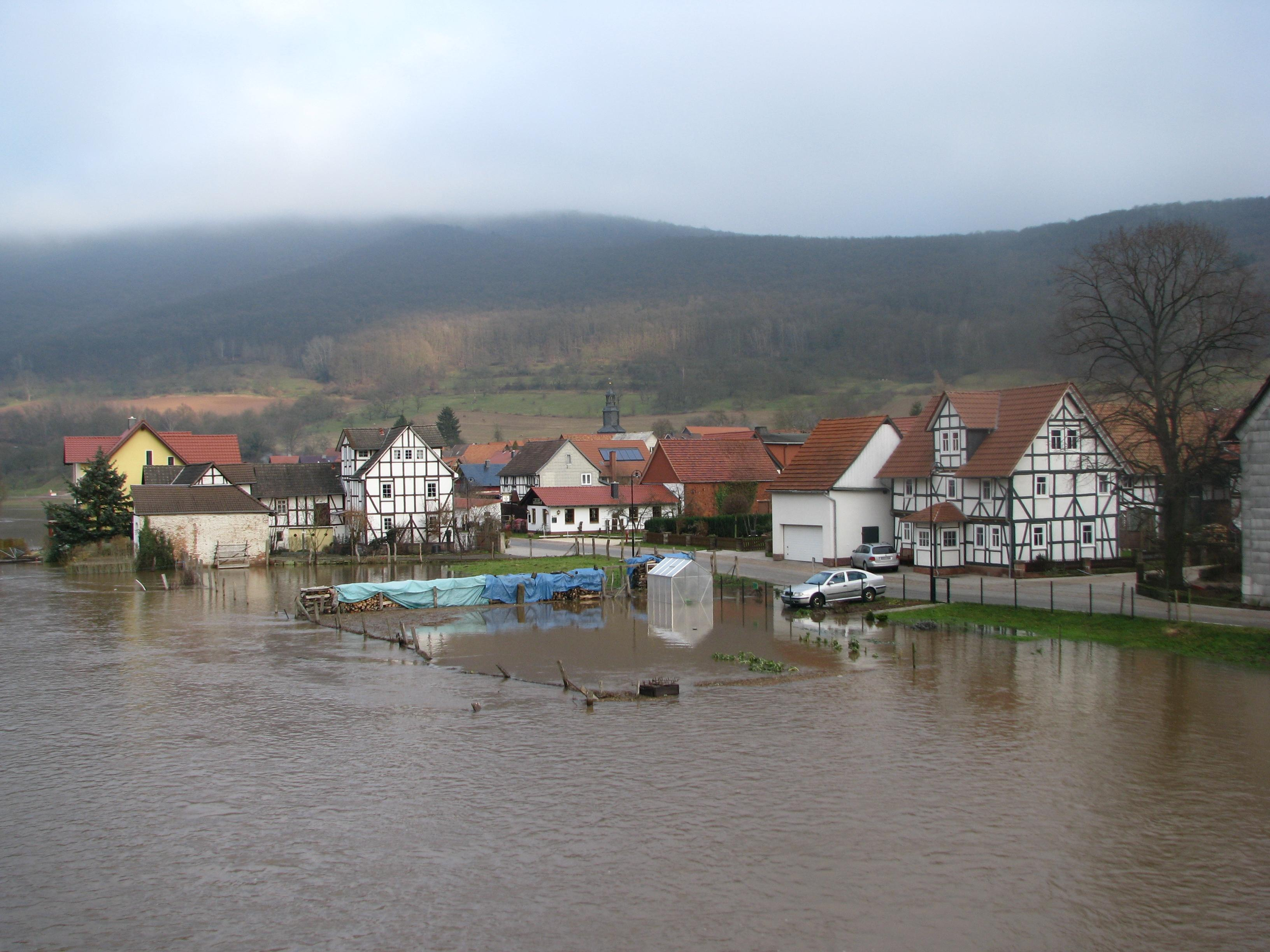 Lindewerra von der Werrabrücke aus gesehen. Dahinter der Höheberg. Vorne mit Werrahochwasser.